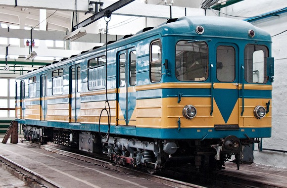 Контактно-аккумуляторный электровоз на базе вагона Еж3-5823 в депо Оболонь Киевского метрополитена.